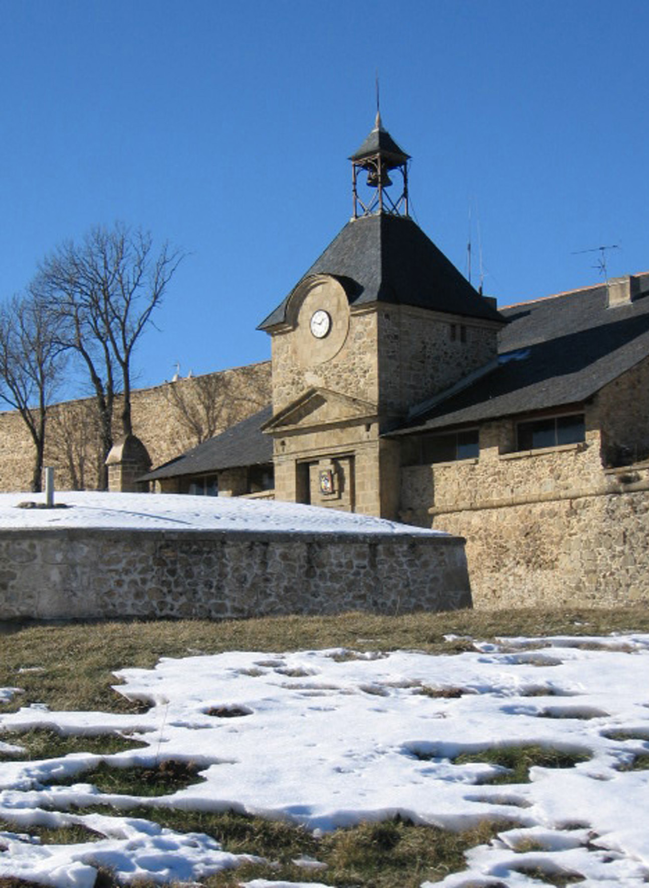 Entrée du fort militaire, citadelle de Mont-Louis (Pyrénées-Orientales, France).